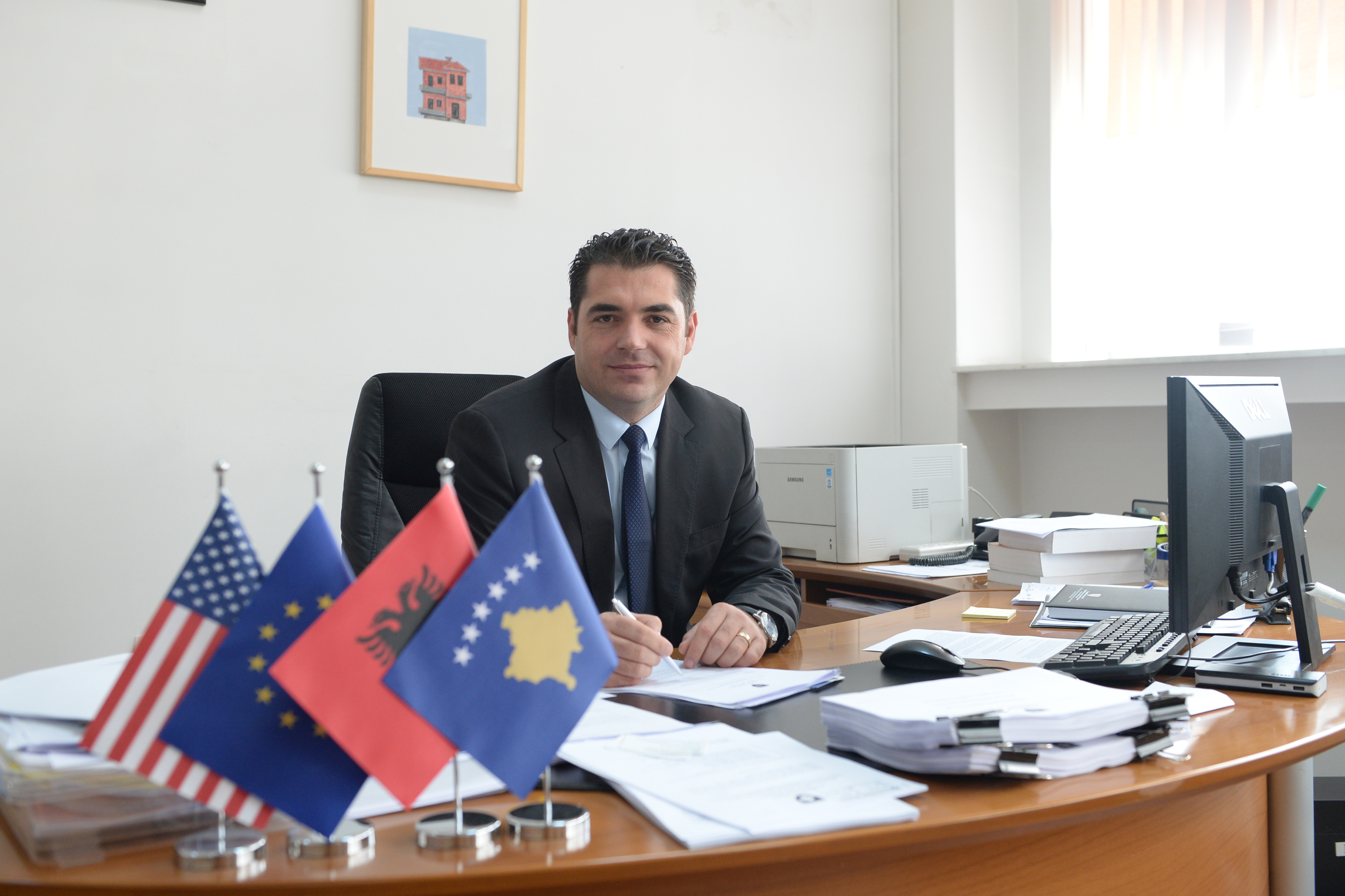 Bajram Hasani, Ministër i Tregtisë dhe Industrisë